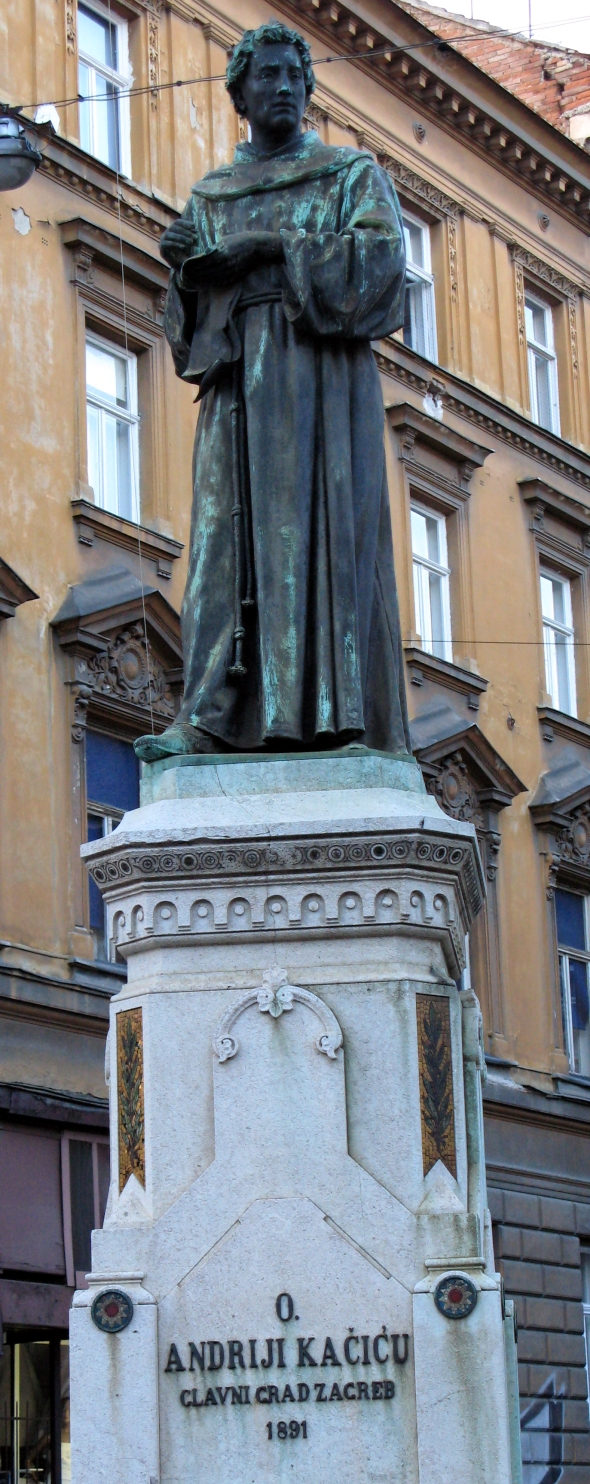 spomenik Andriji Kačiću Miošiću, djelo Ivana Rendića iz 1891. g., Zagreb